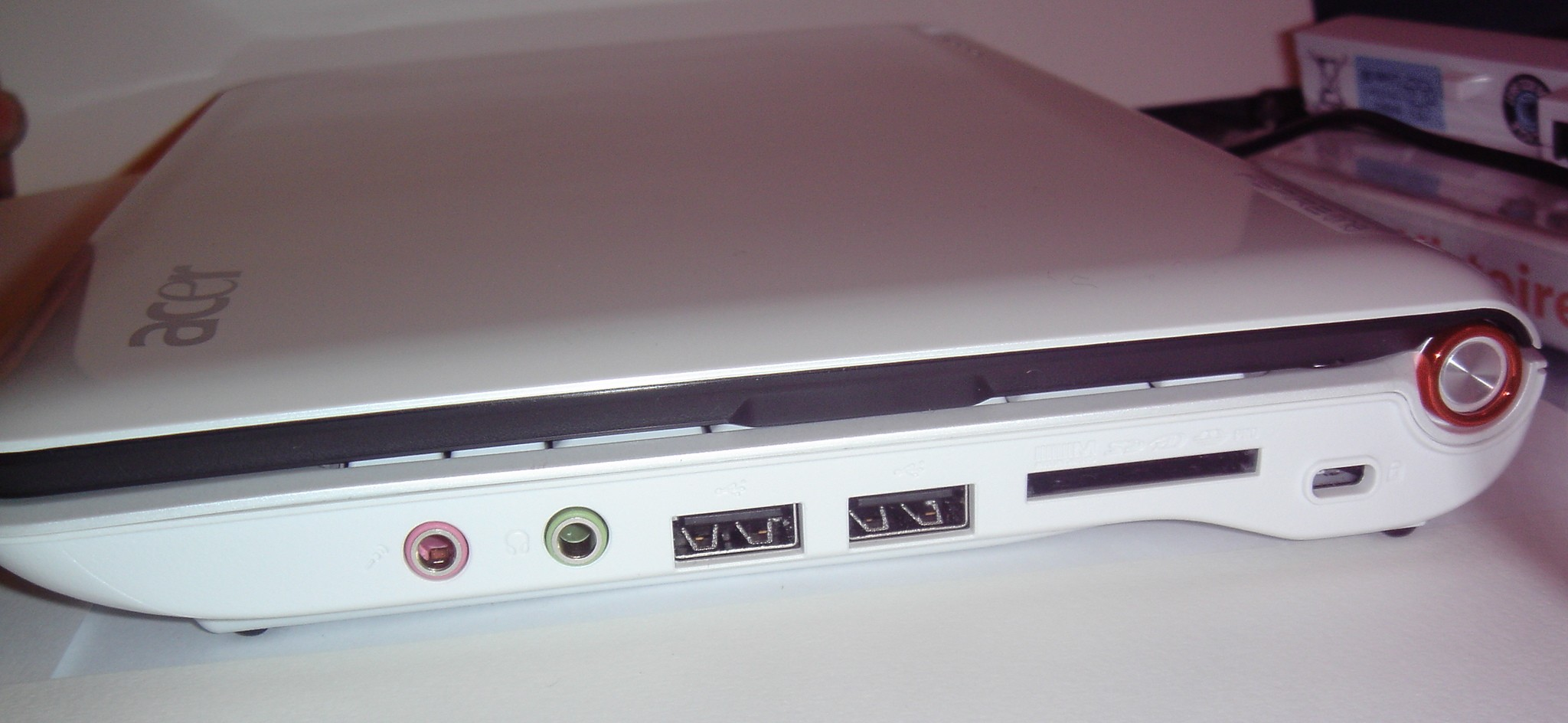 Photographie des ports disponibles sur l'Acer Aspire One (côté droit).